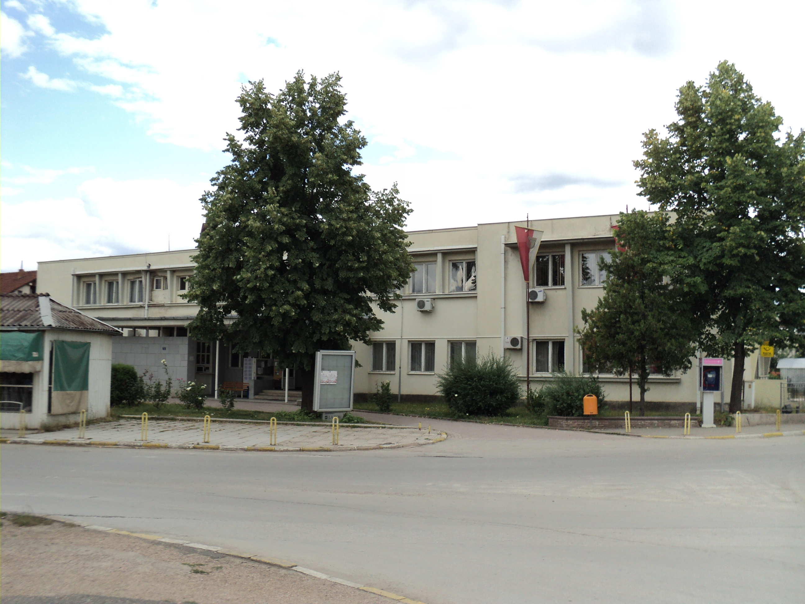 Zgrada Opštine u Kičevu